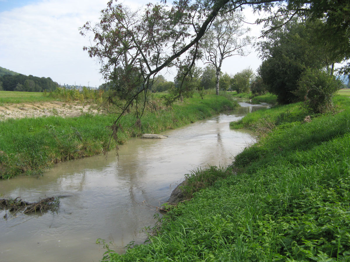 Die Bünz bei Dottikon